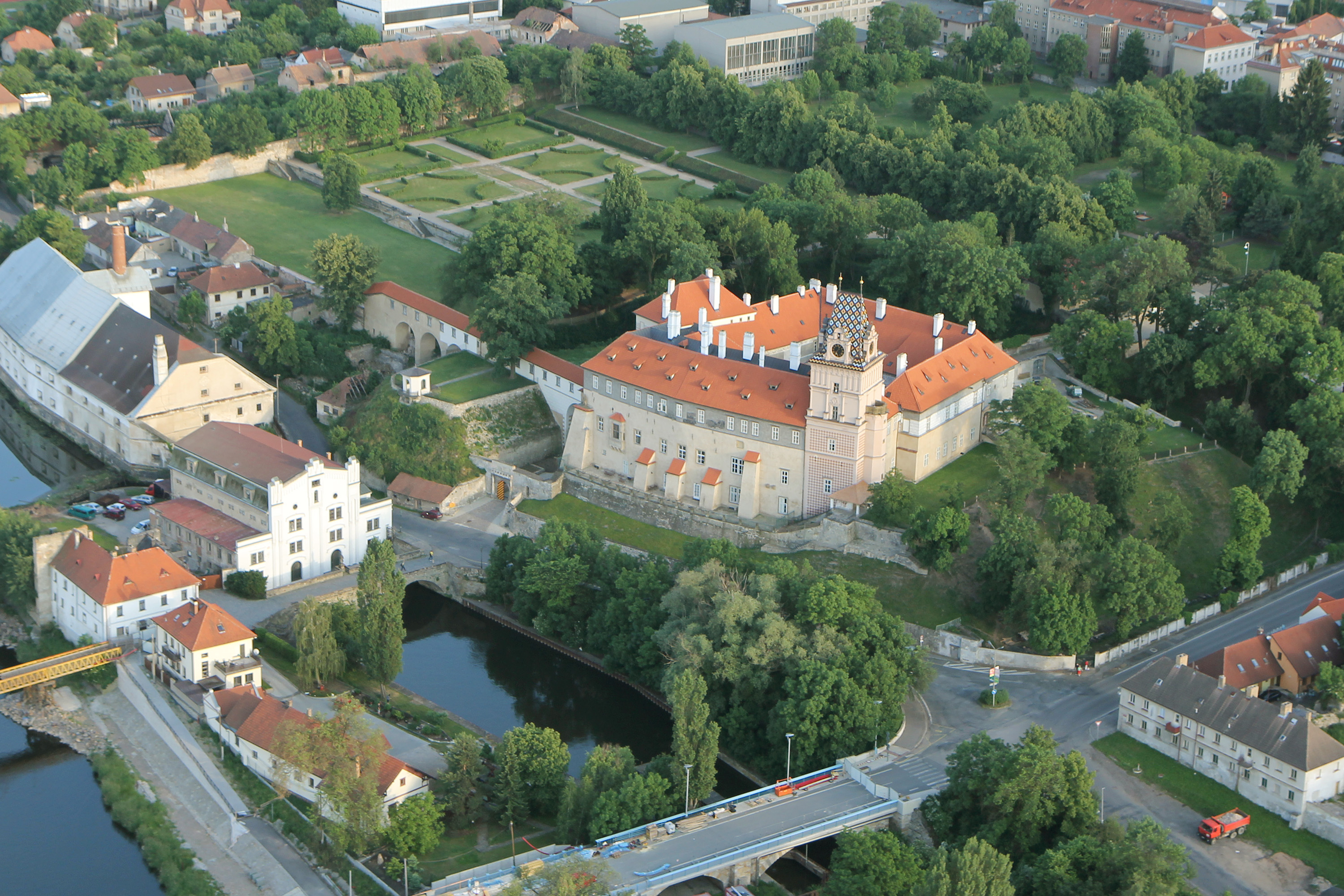 Zámek Brandýs nad Labem, nad řekou 402/8, Brandýs nad Labem